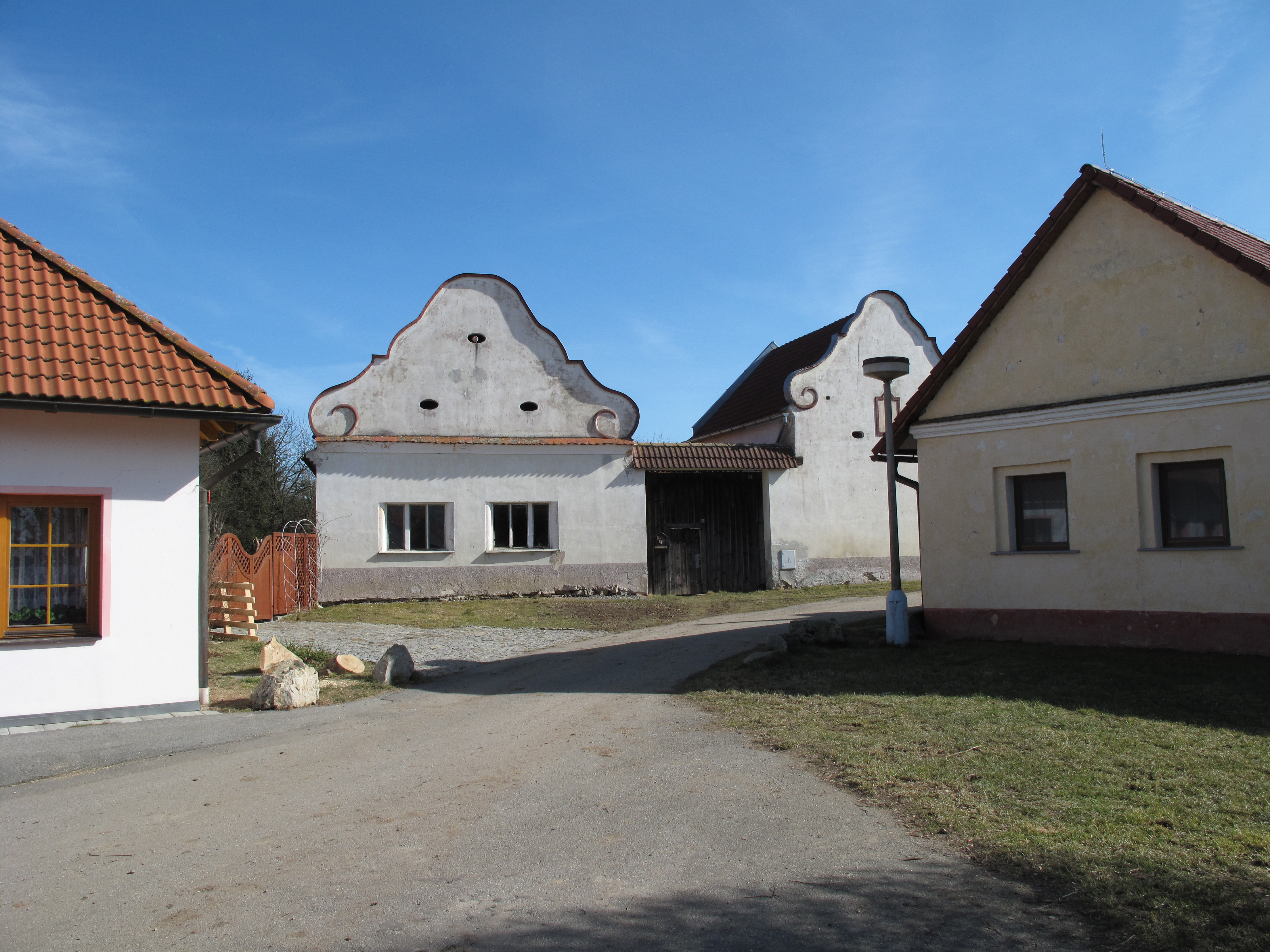 Fasáda v Protivci. Okres Prachatice, Česká republika.